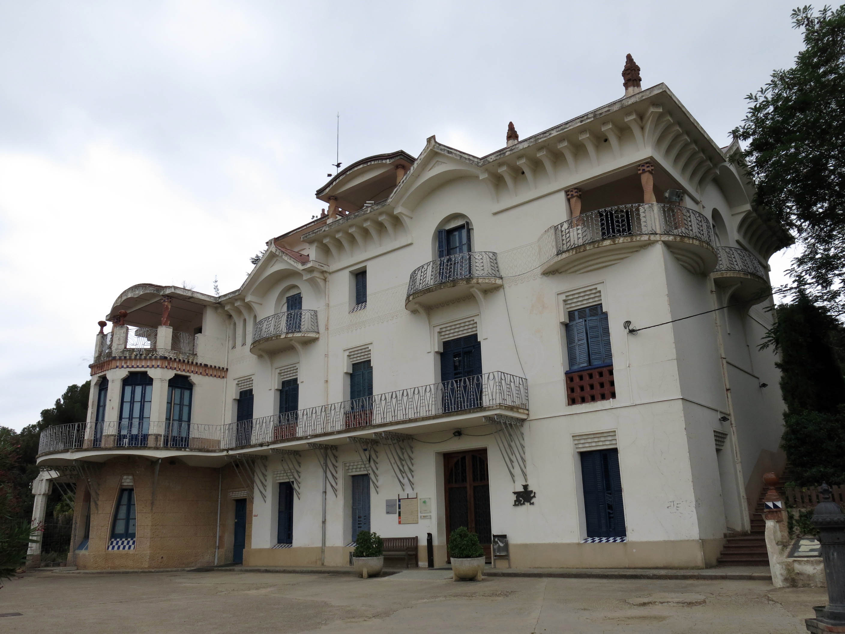 Villa Flora (Canet de Mar)